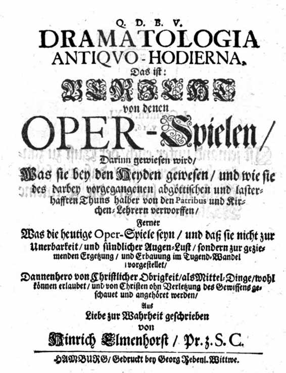 Q[uod] D[eus] B[ene] V[ertat]Dramatologia antiquo-hodierna,Das ist:Berichtvon denenOper-Spielen /darinn gewiesen wird /Was sie bey den Heyden gewesen / und wie siedes darbey vorgegangenen abgöttischen und laster-hafften Thuns halber von den Patribus und Kir-chen-Lehrern verworffen /FernerWas die heutige Oper-Spiele seyn / und daß sie nicht zurUnerbarkeit / und sündlicher Augen-Lust / sondern zur gezie-menden Ergetzung / und Erbauung im Tugend-Wandel vorgestellet /Dannenhero von Christlicher Obrigkeit / als Mittel-Dinge / wohlkönnen erlaubet / und von Christen ohn Verletzung des Gewissens ge-schauet und angehöret werden /AusLiebe zur Wahrheit geschriebenvonHinrich Elmenhorst / Pr[ediger] z[u] S[anct] C[atharinenHamburg 1688, Titelseite